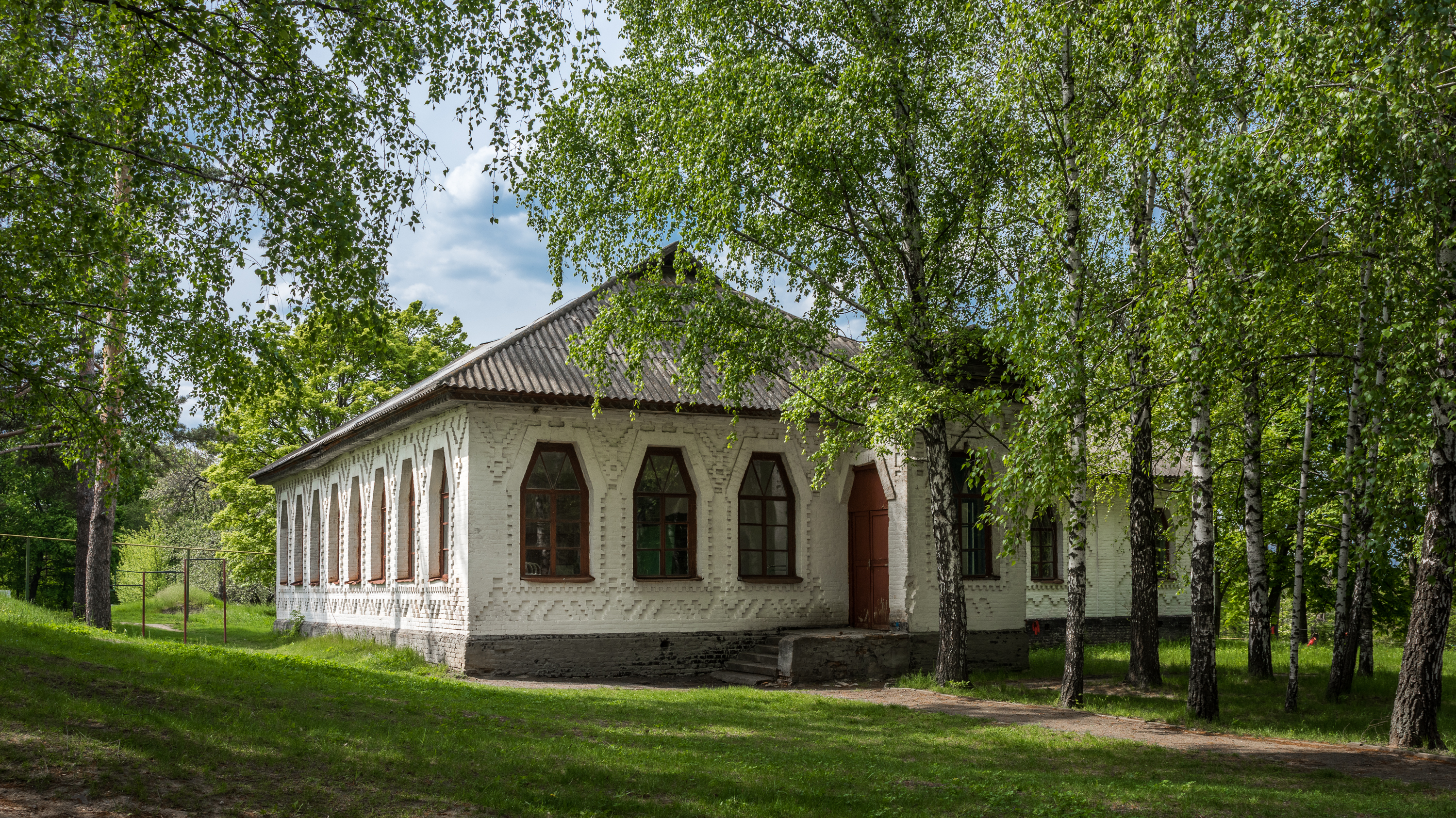 Двокомплектна земська школа в селі Безсали (північ села) Лохвицького району Полтавської області. Стиль - український архітектурний модерн. Архітектор Опанас Сластьон.